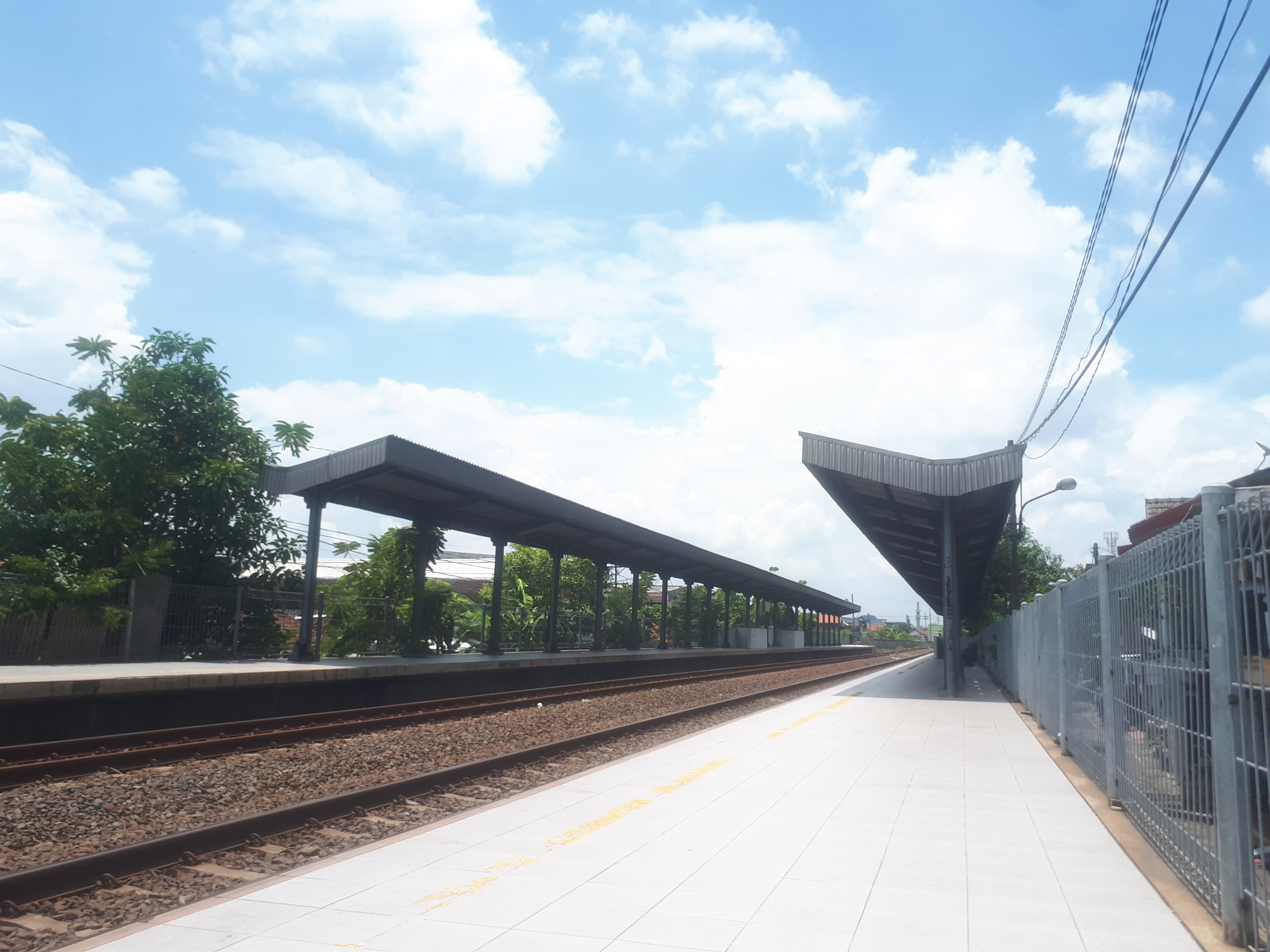 Tampak luar Halte Ngagel tahun 2020